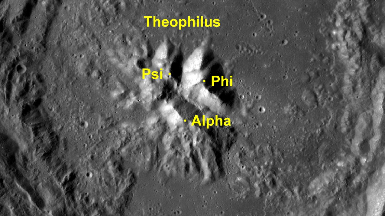 Cráter lunar Theophilus. Picos centrales. (Imagen LRO)